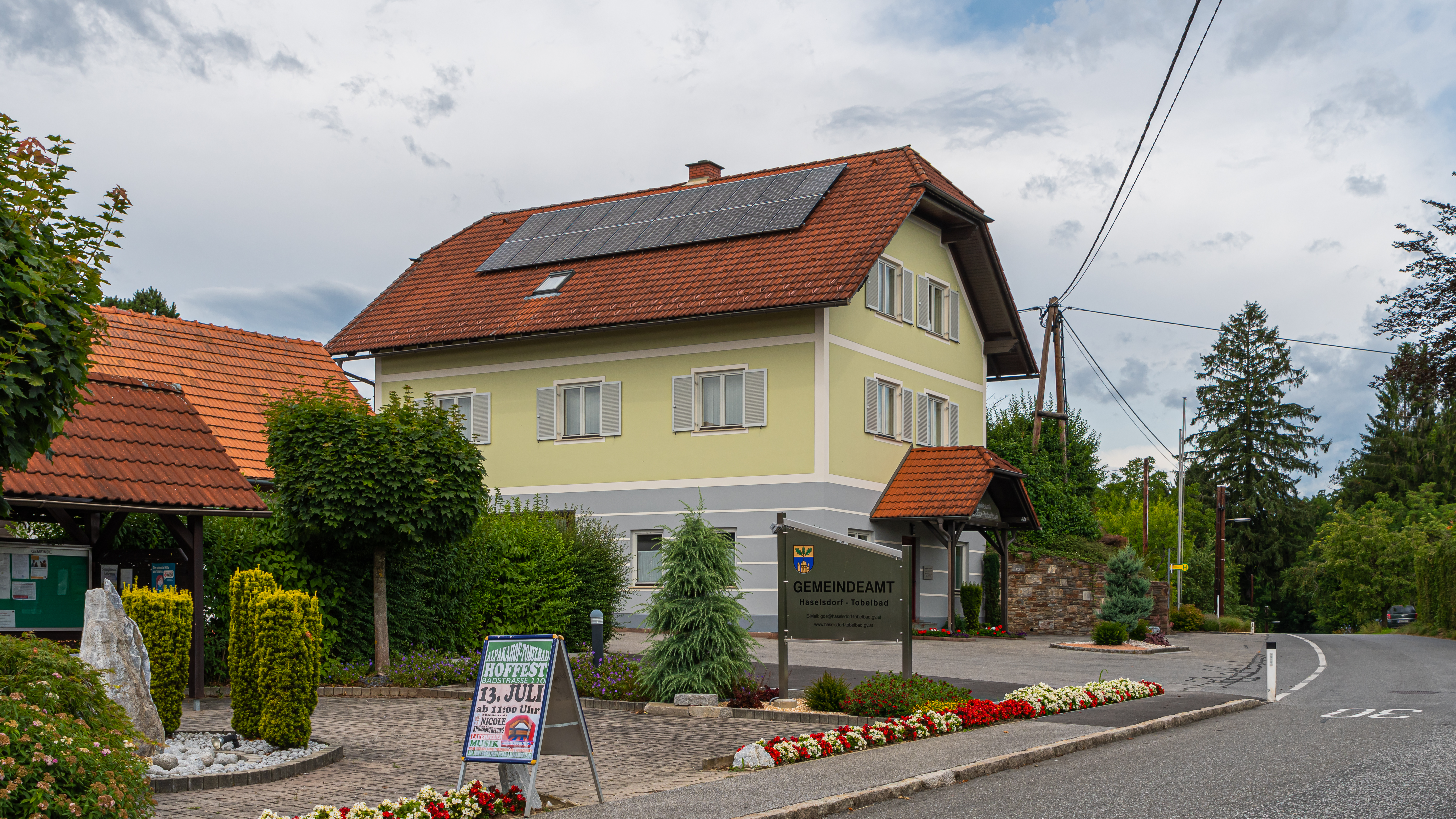 Haselsdorf Tobelbad Gemeindeamt